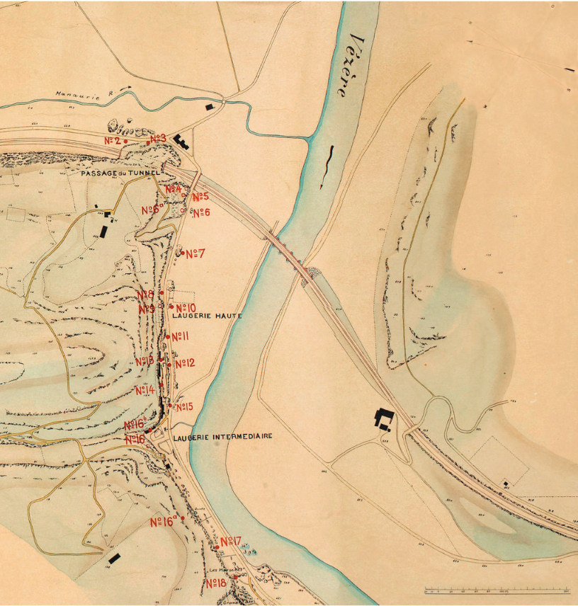 Übersichtsplan der prähistorischen Fundstätten No. 1-41 und Font de Gaume in der Umgebung von Les Eyzies im Tale der Vézère. Aufgenommen und gezeichnet von April 1907 – Mai 1908 von Th. Baumgartner, Ingenieur u. Konkordatsgeometer Seebach-Zürich Scalebar = 220 m